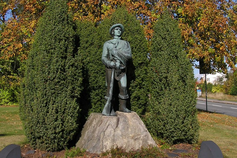 Snapphanestatyn vid Loshultsvägen i Lönsboda. Designad av Anders Jönsson.